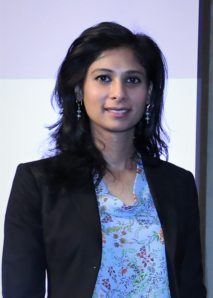 Economista India estadounidense actualmente economista jefe del FMI